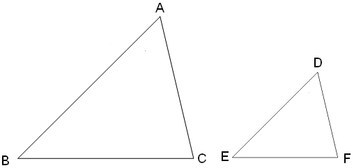 Similar triangles